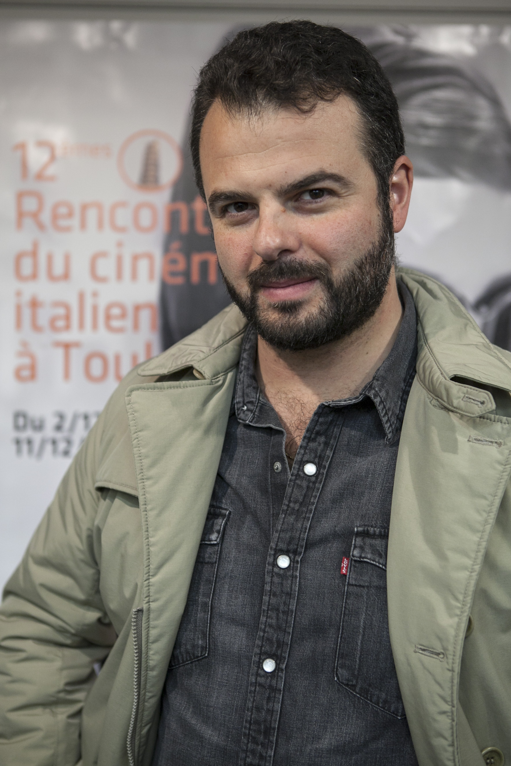 Edoardo De Angelis - réalisateur de Indivisibili